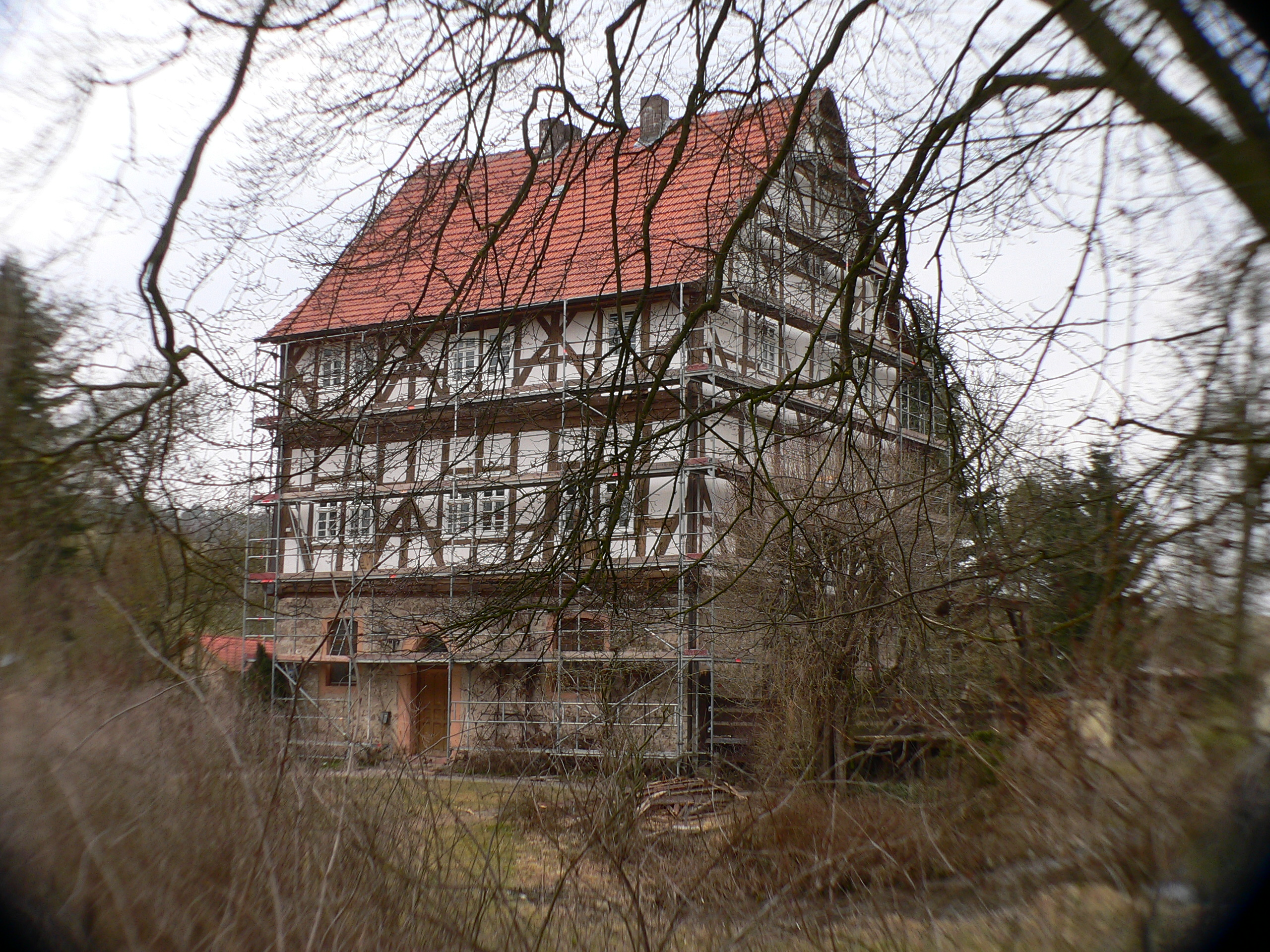 Wasserburg Schwarzenhasel in Rotenburg a.d. Fulda- Schwarzenhasel, Hessen, Regierungsbezirk Kassel, Landkreis Hersfeld-Rotenburg